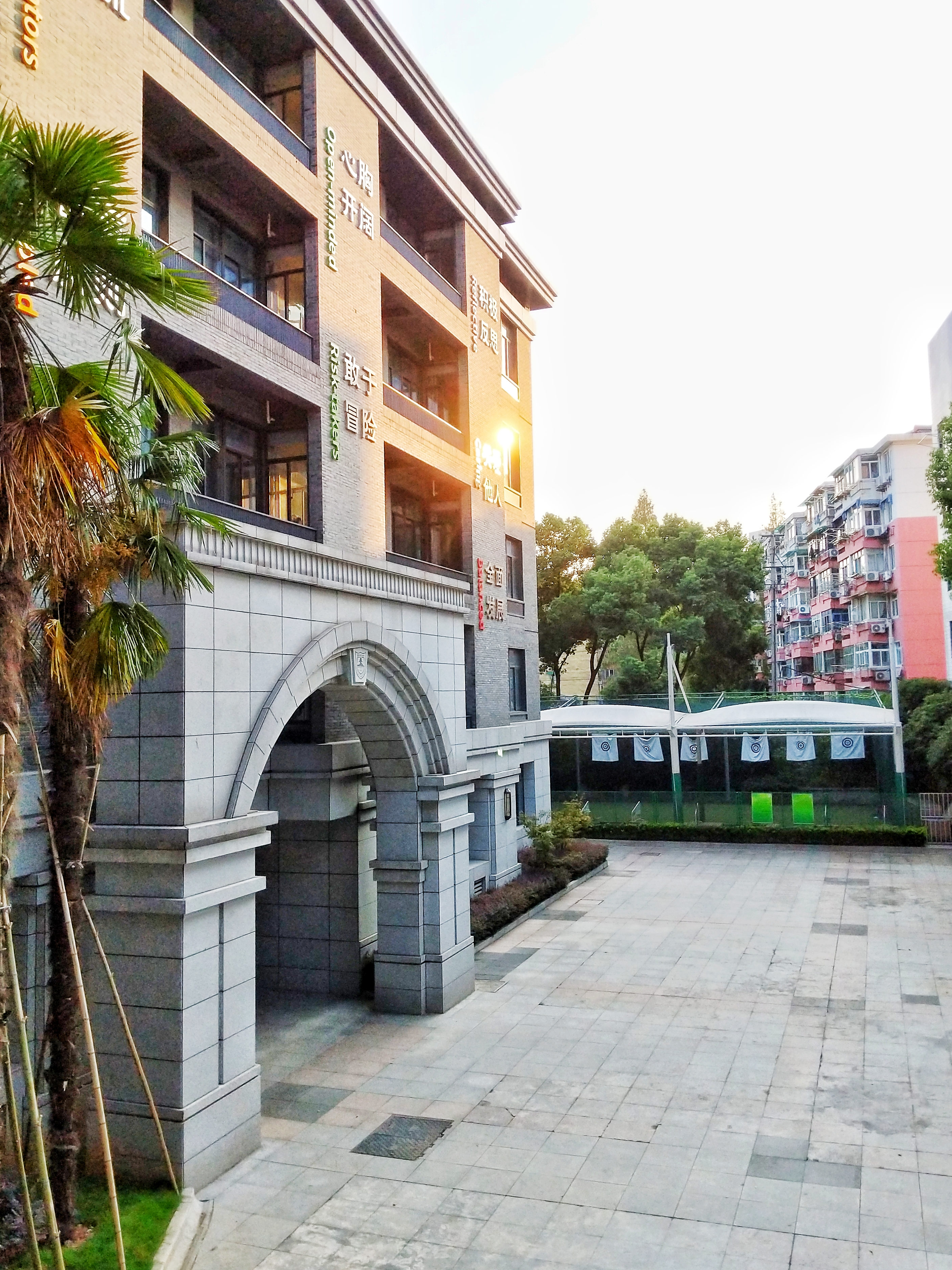 中文（中国大陆）: 夕阳下的 南师附中IB国际文凭部